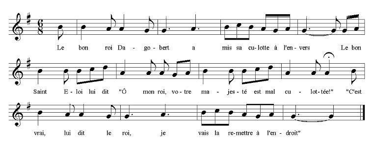 Partitions Le Bon Roi Dagobert.